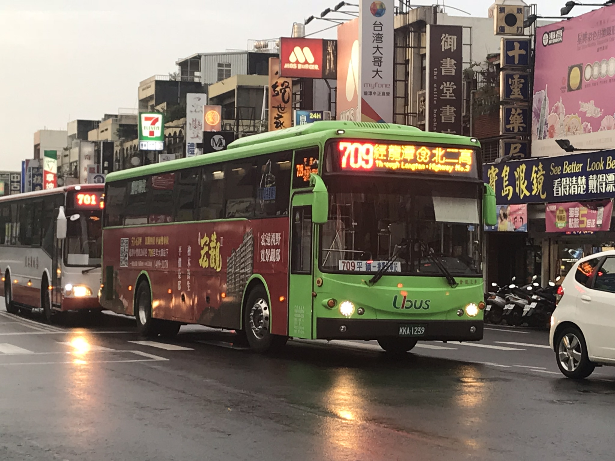 統聯客運 KKA-1239